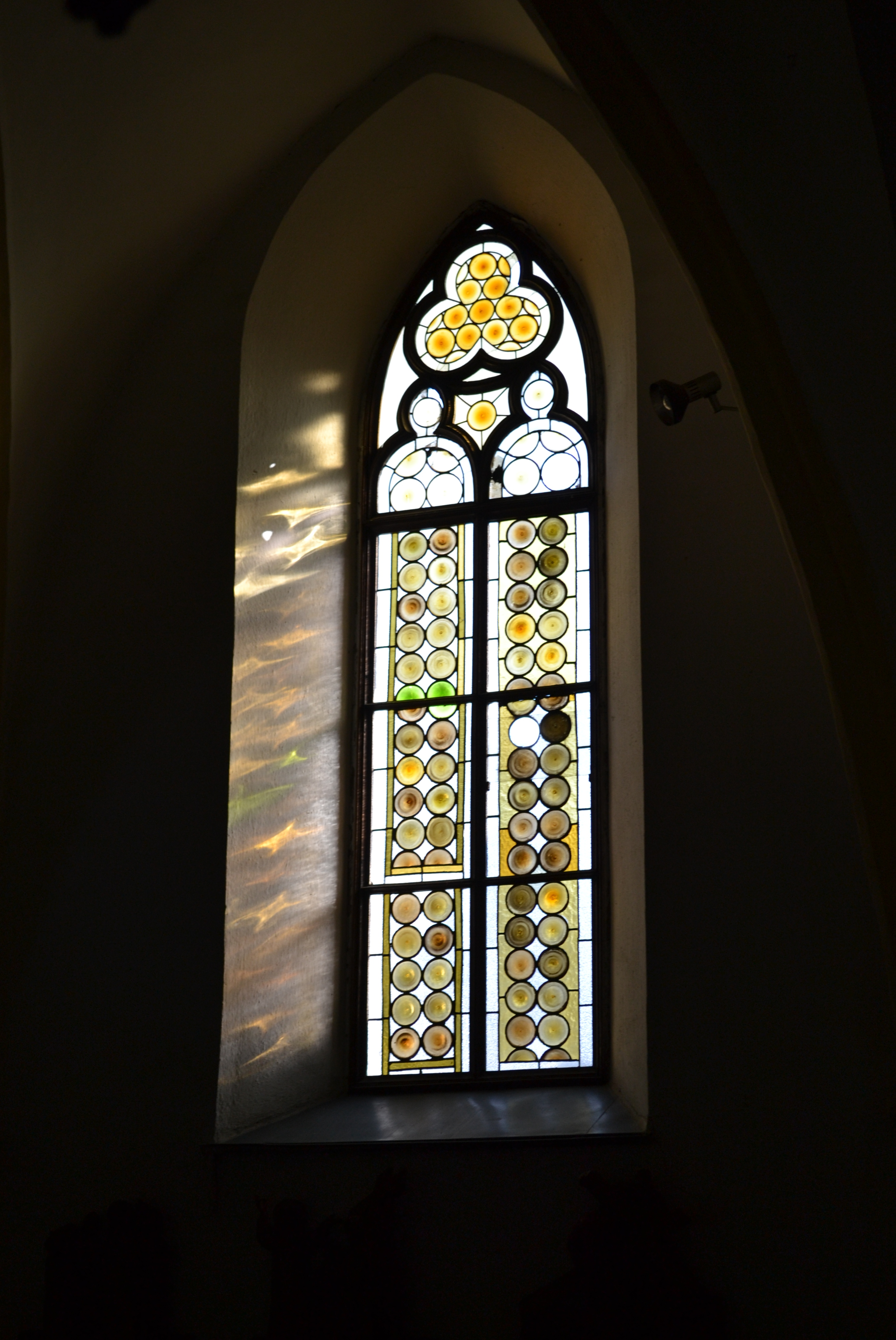 lomené okno v hlavní lodi v kostele Nejsvětější Trojice (Raduň, Moravskoslezský kraj, Česká republika)